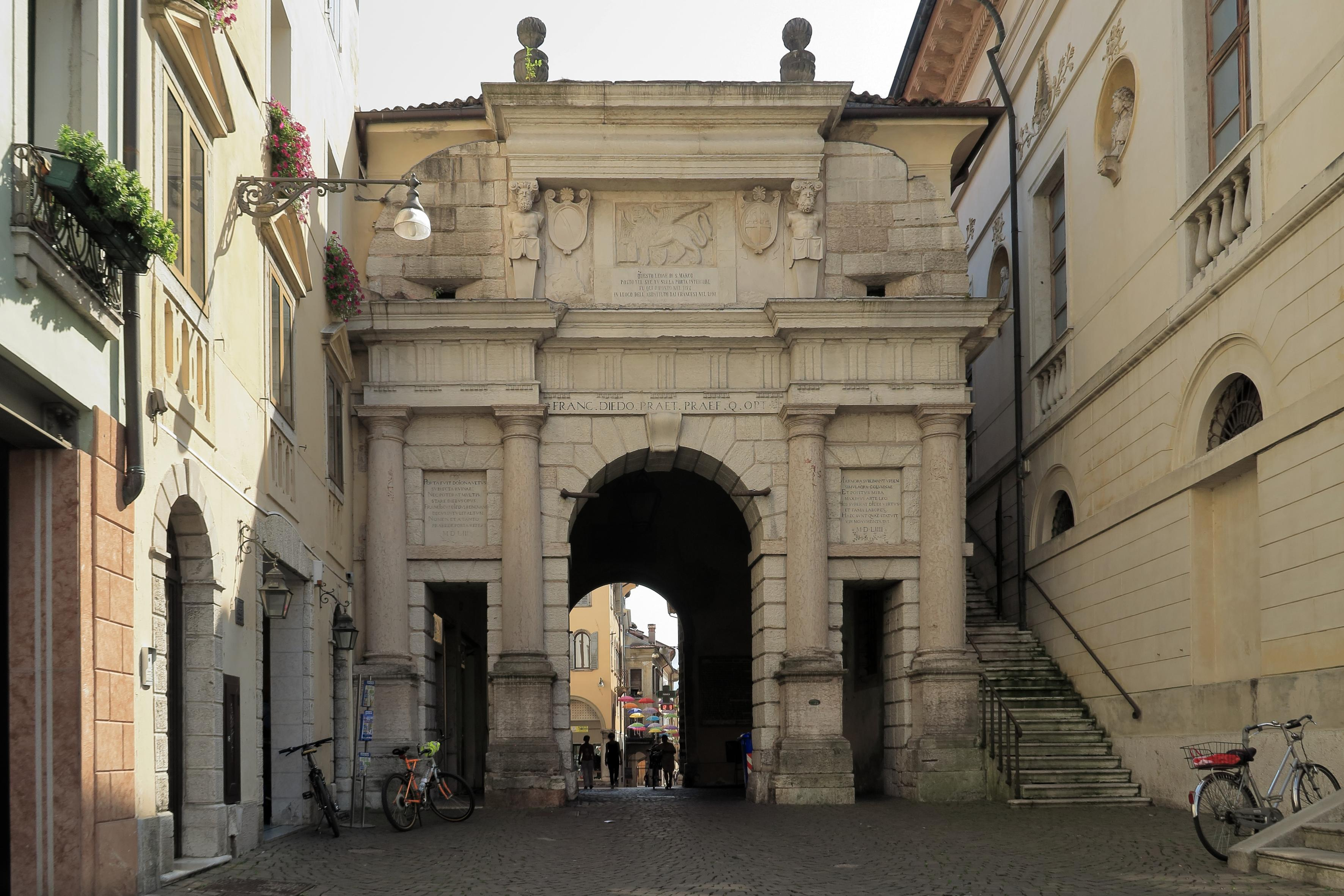 Porta Dojona lato nord This is a photo of a monument which is part of cultural heritage of Italy.